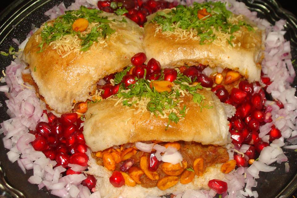 sweet and sour dish.